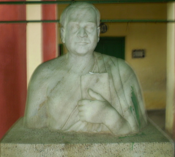 Dwarokanath Bidyabhisan at Harinavi Scool